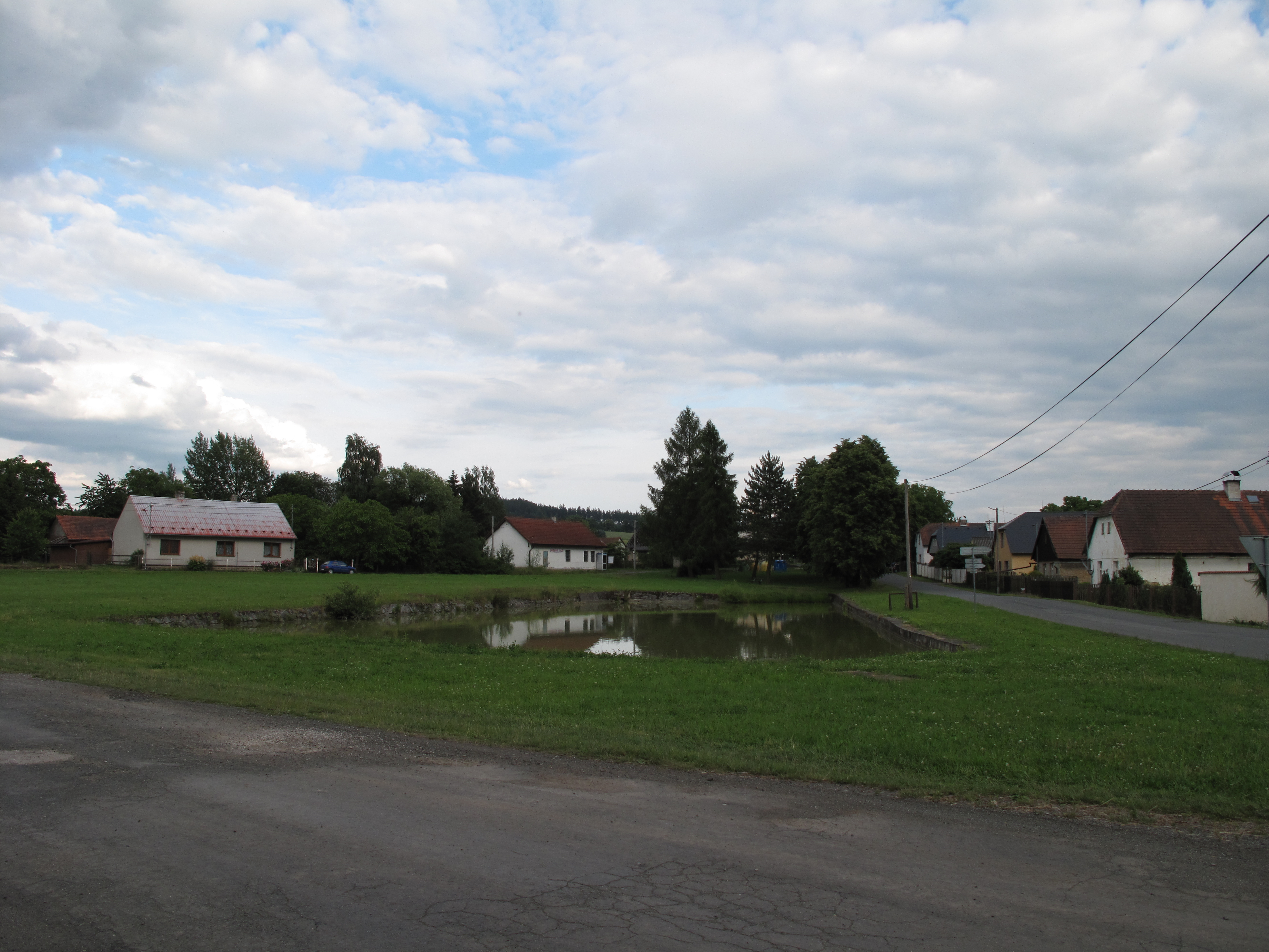 Rybník v Trokavci. Okres Rokycany, Česká republika.